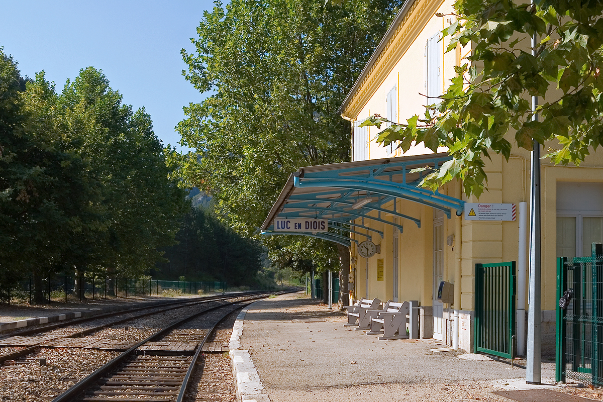 Gare de Luc-en-Diois (France-Drôme) - Ligne de Livron à Aspres-sur-Buëch